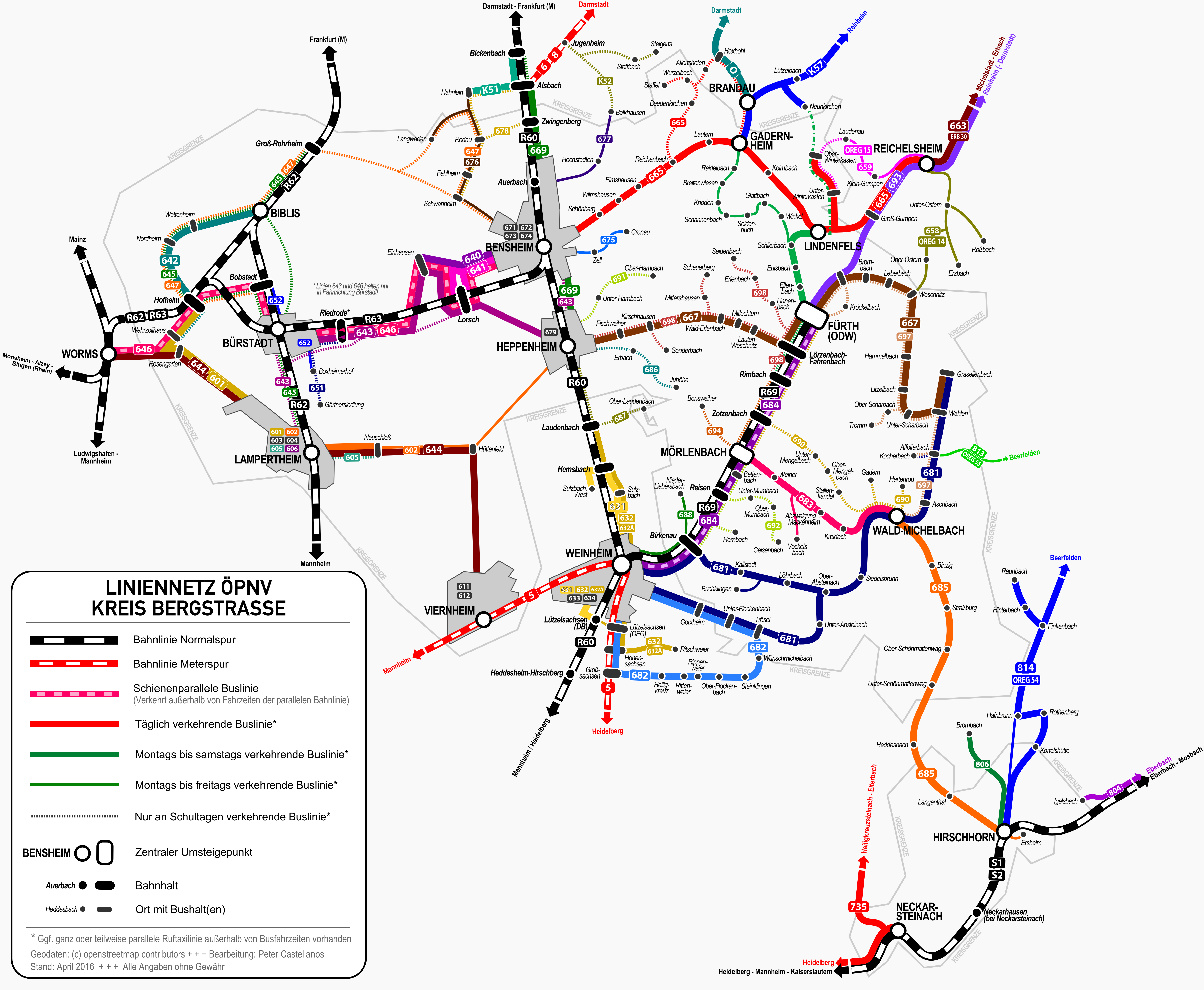 Schematische Darstellung Liniennetz des öffentlichen Nahverkehrs im Landkreis Bergstraße ohne Ruftaxilinien. Stand April 2016